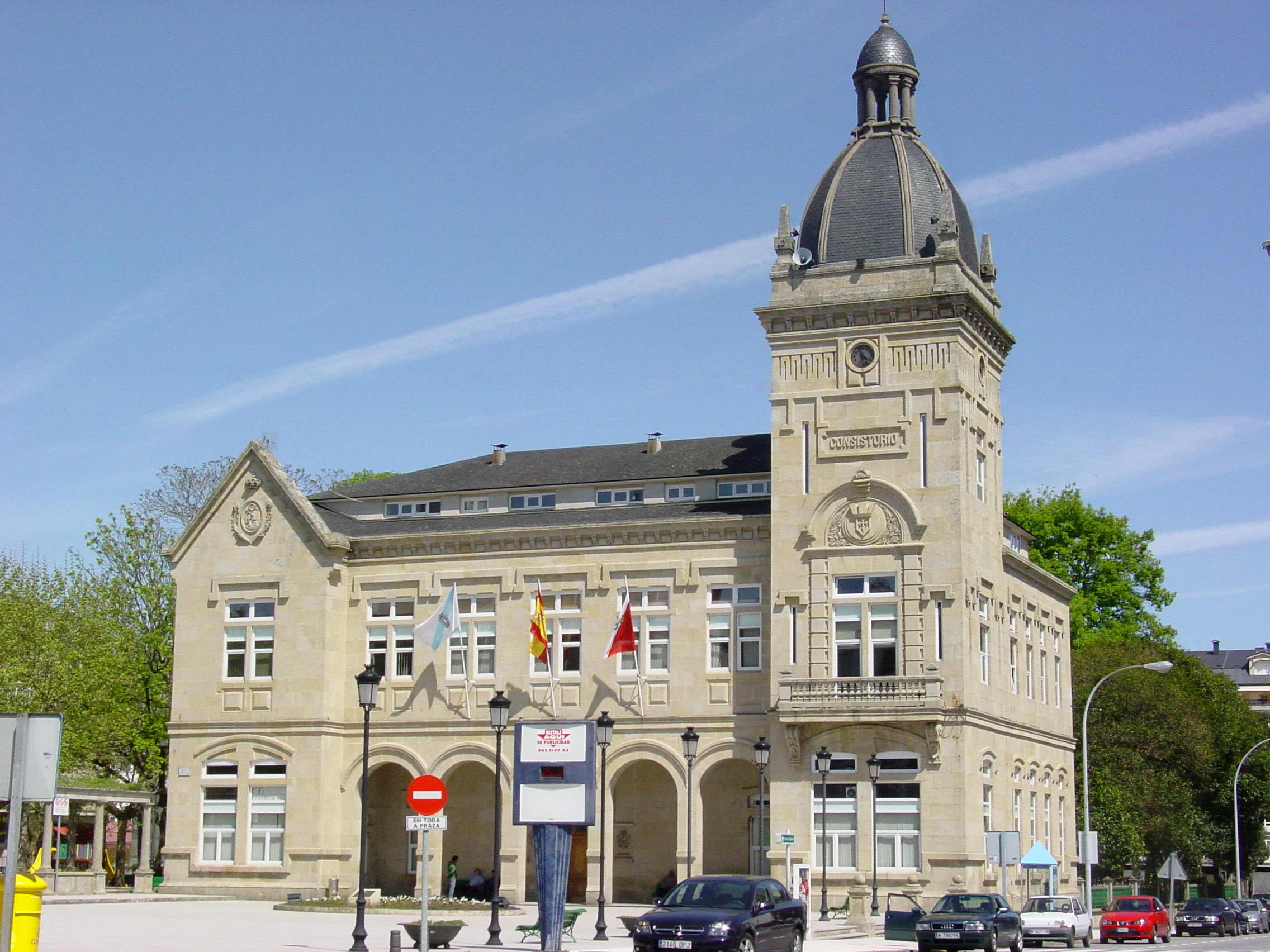 Consistorio da Estrada. Galicia. España